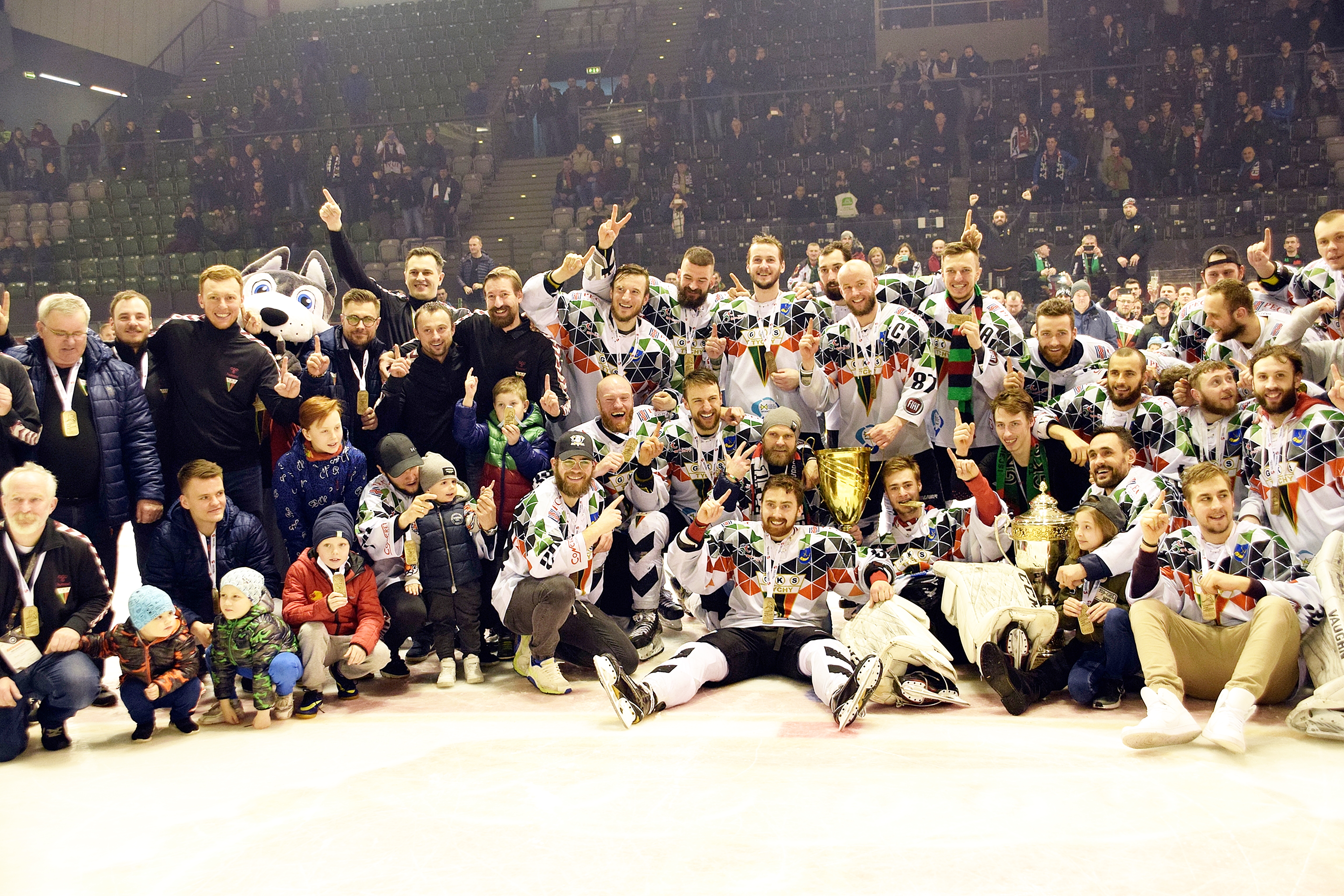 Finał Mistrzostw Polski 2017-18 w Hokeju na lodzie GKS Tychy - Tauron KH GKS Katowice 2-1 (d)